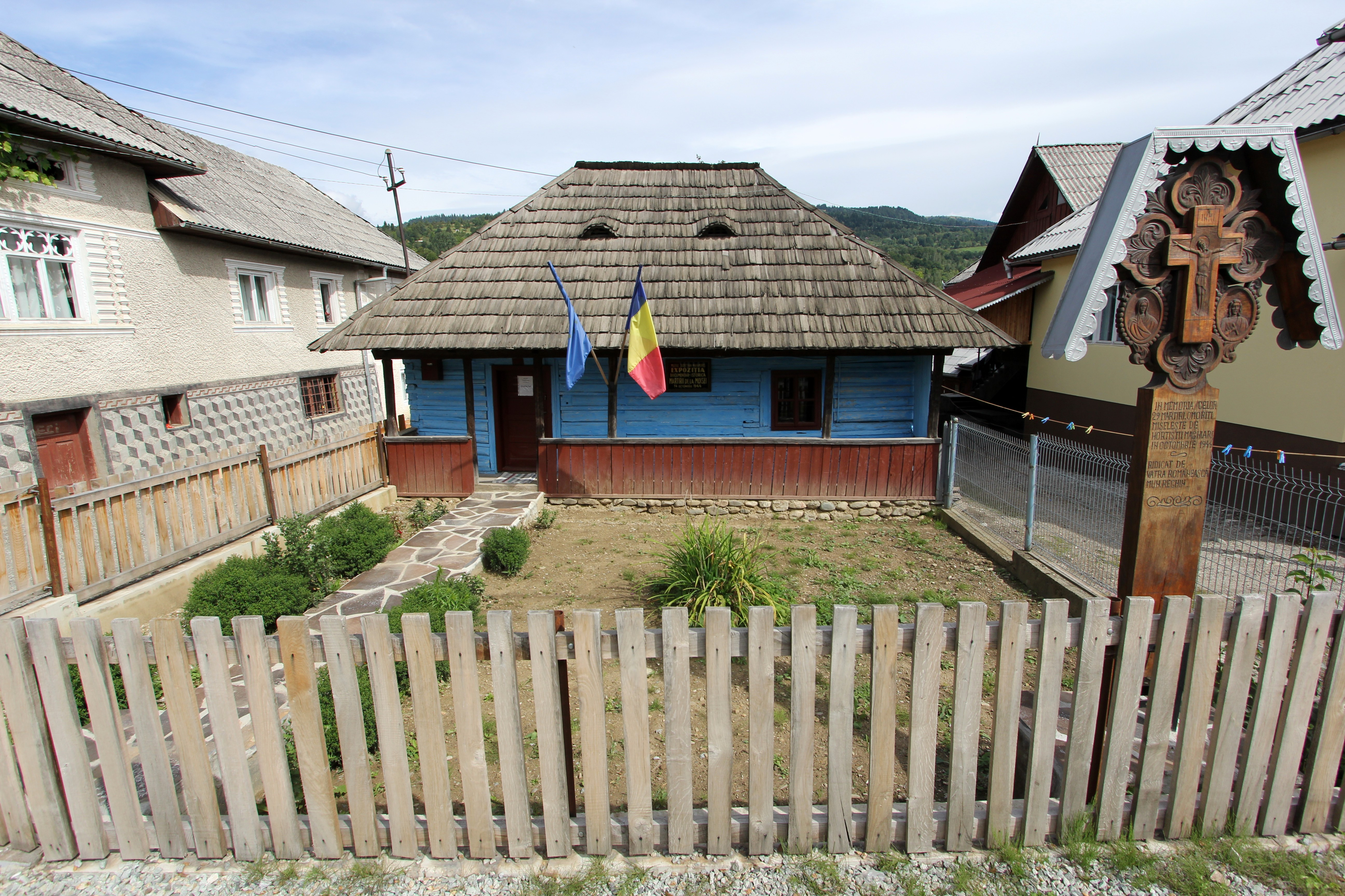 Casa de lemn a martirilor asasinați în august 1944, Moisei